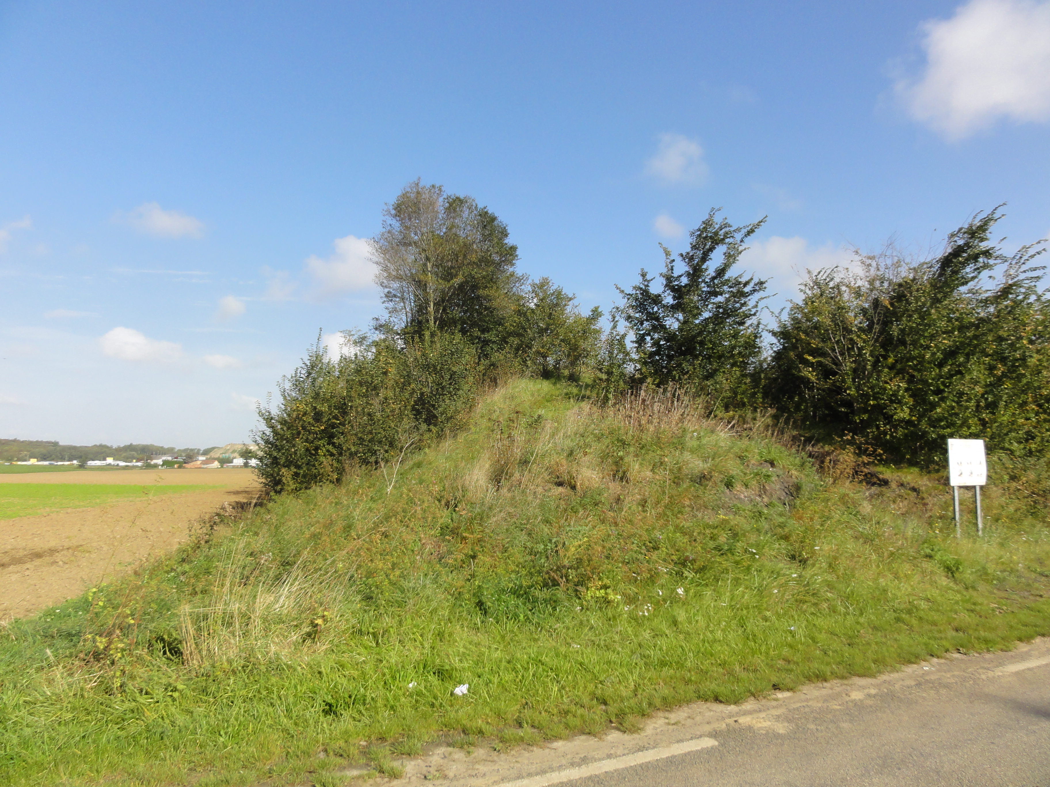 Terril n° 63A dit Cavalier du 9 d'Annequin, fosse n° 9 de la Compagnie des mines de Béthune dans le bassin minier du Nord-Pas-de-Calais, Sailly-Labourse, Pas-de-Calais, Nord-Pas-de-Calais, France.